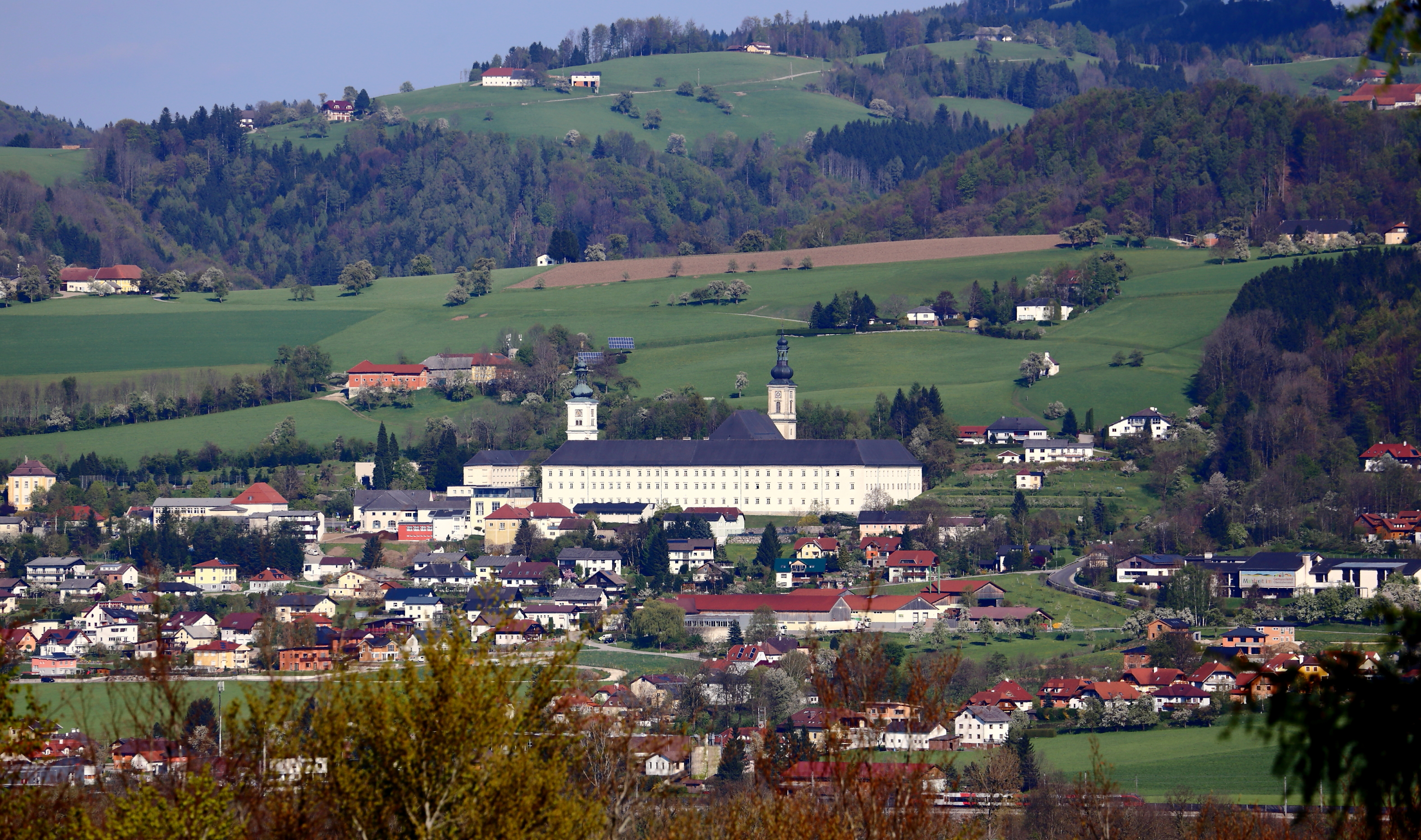 Westansicht der oberösterreichischen Gemeinde Schlierbach.